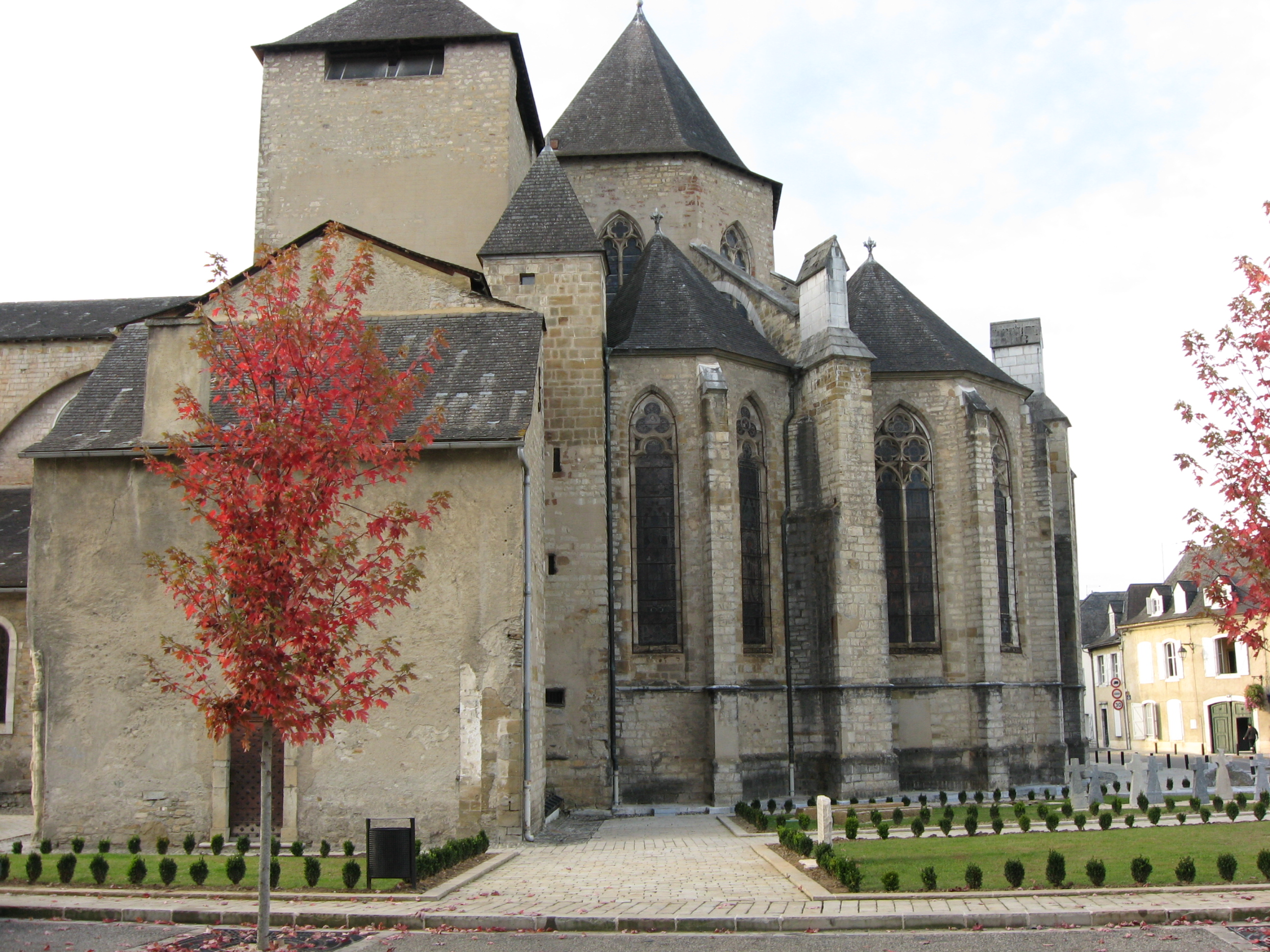 Vue partielle de la Cathédrale Sainte Marie (Pyrénées Atlantiques) Pyrénées).